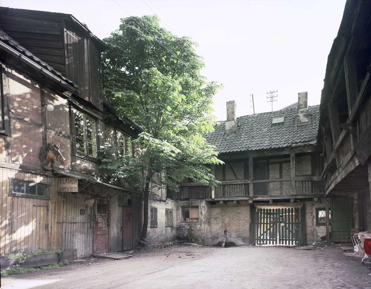 Brugata 6 var inntil den ble totalskadd i brann i 1988 en fredet bondehandelsgård som var bygd av Arne Hansen Killerud i 1760-årene.Brugata 6 ble fredet i 1927.